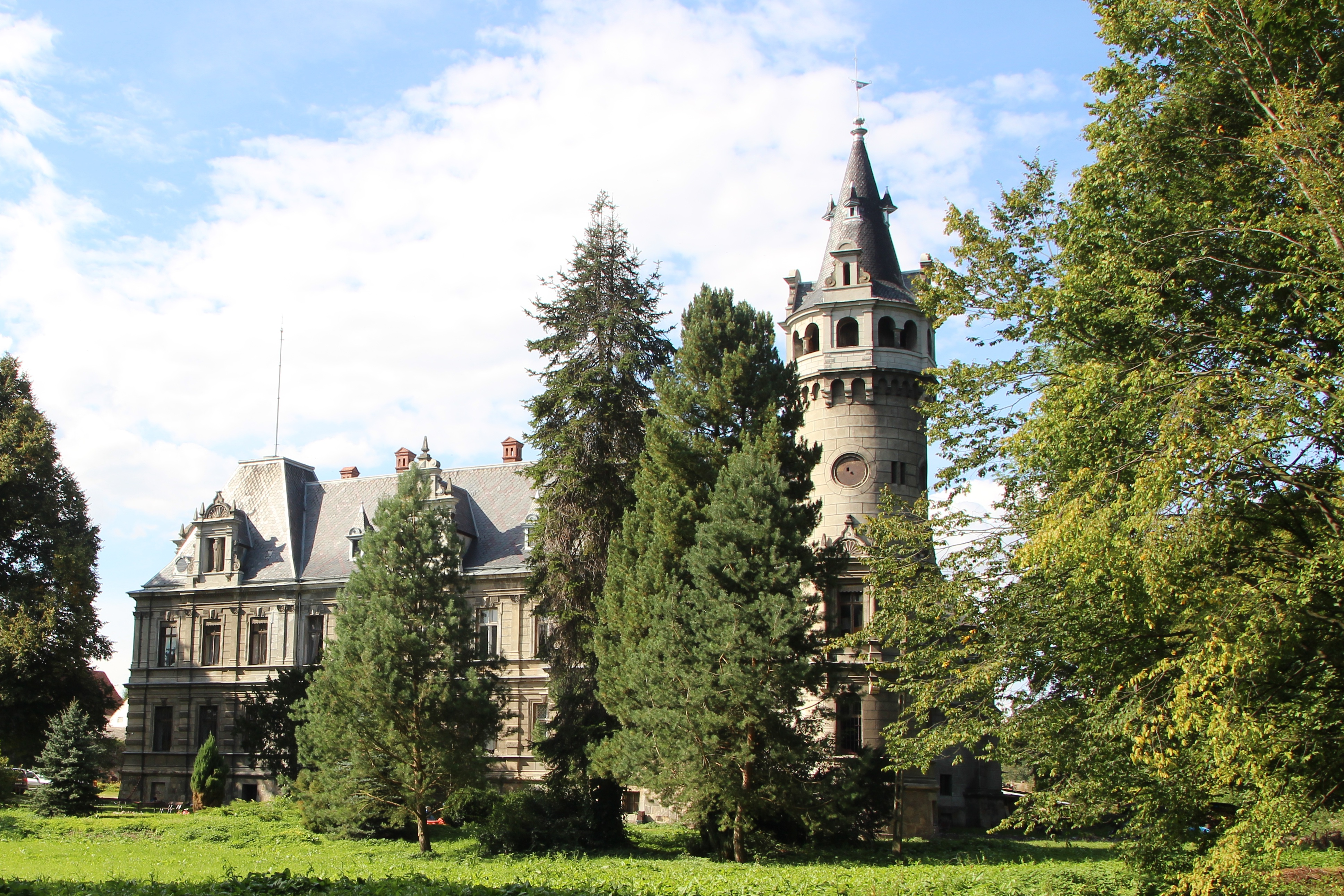 Pałac w Rysiowicach – wieś w Polsce położona w województwie opolskim, w powiecie nyskim, w gminie Otmuchów.